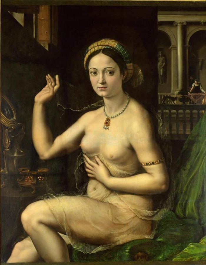 «Donna al Bagno» (so called La Fornarina)